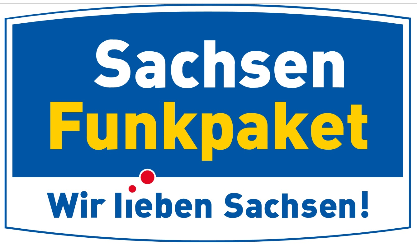 Logo Sachsen Funkpaket